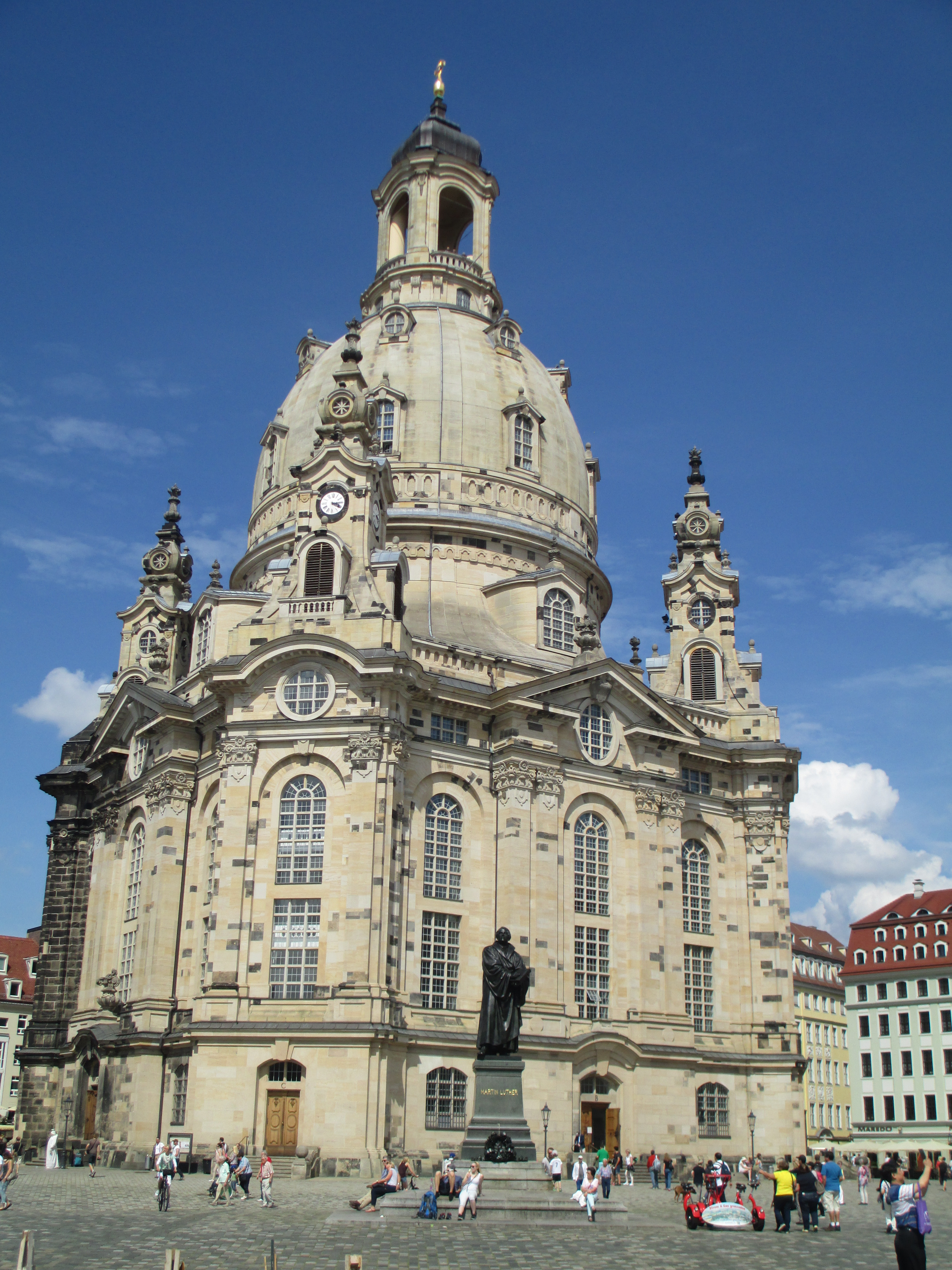 כנסיית פראואנקירכה ופסל מרטין לותר בדרזדן